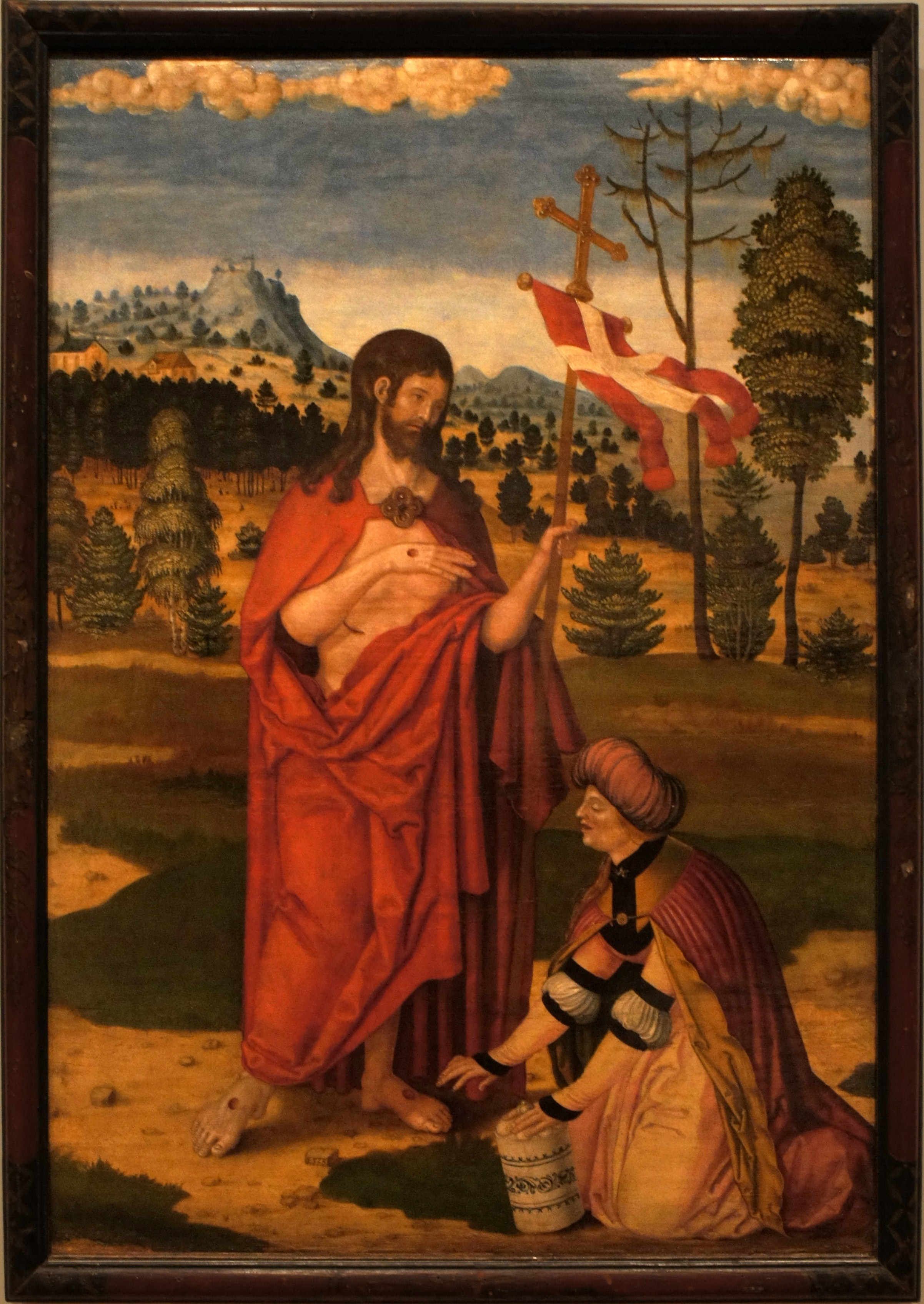 Apparition du Christ à Marie-Magdeleine (Peinture de Wilhelm Stetter)